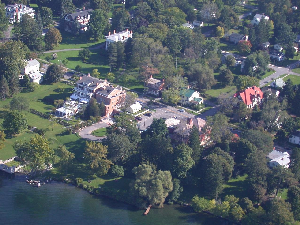 Aurora inn aerial view